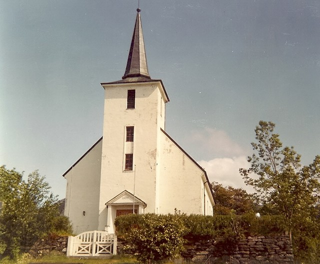 Stavang kirke i Flora